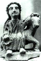 Kamienna rzeźba Epony znaleziona na wzgórzu Auxois (Francja)